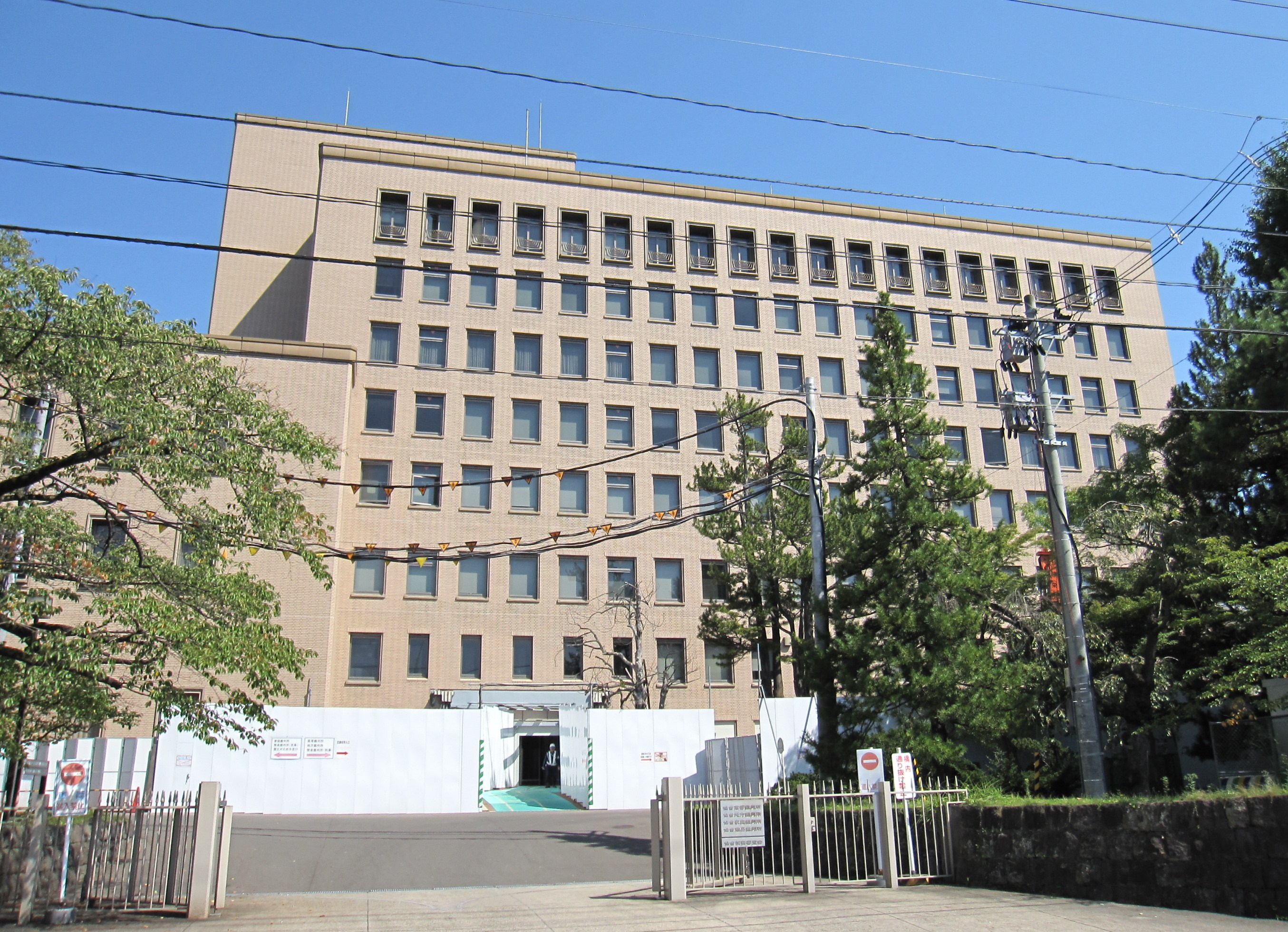 仙台高等裁判所・仙台地方裁判所